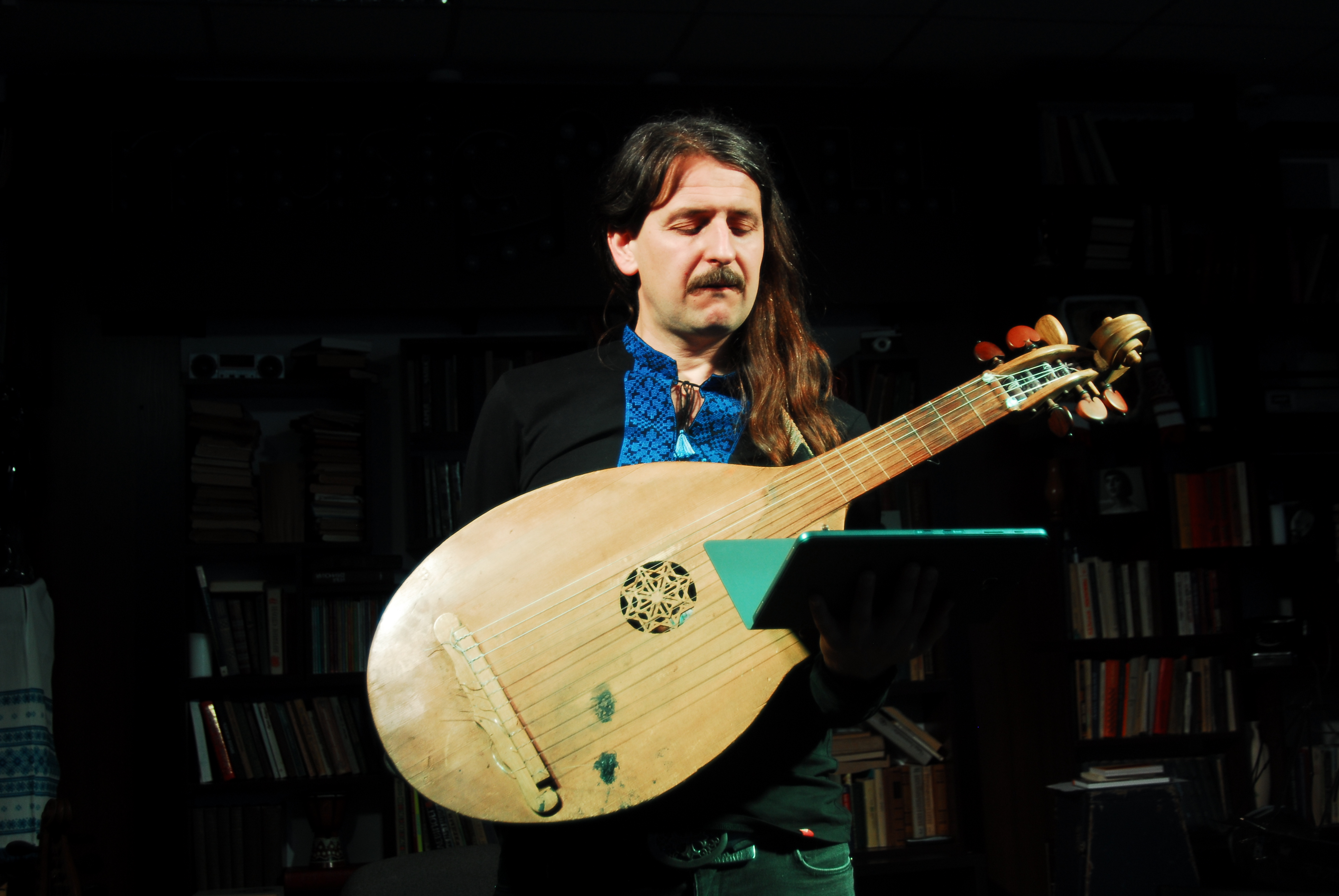 В Мелитополе